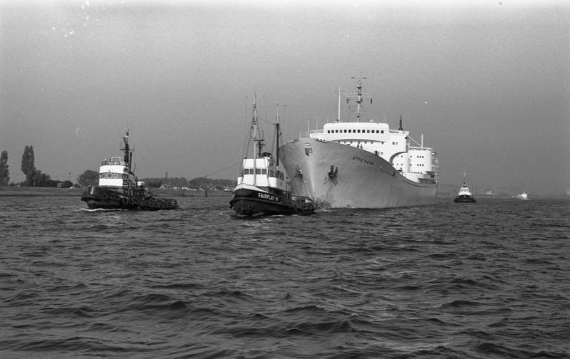 Atomschiff "Otto Hahn" im Hamburger Hafen